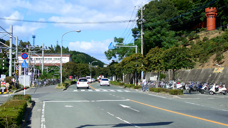 JR鹿児島本線崇城大学前駅 駅前風景 駅南側の踏切付近から跨線橋から北を見る。 写真左側が鹿児島本線、右側が祟城大学。道路は熊本県道31号熊本田原坂線。 撮影者/著者/著作権保有者 : MK Products 撮影日 : 2007/10/27 崇城大学前駅用にアップロードした画像です。良い画像があれば別の画像に変えてください。 Description In front of the Soujyou-daigaku-mae station. Date27 October 2007SourceOwn work by the original uploaderAuthorMK ProductsPermission(Reusing this file) GFDL In front of the Soujyou-daigaku-mae station.